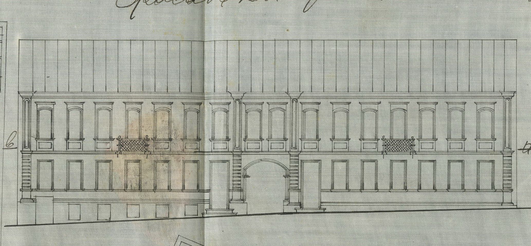 Беларуская (тарашкевіца): Менск (Miensk), вуліца Зборавая (vulica Zboravaja). Дом Грынгаўза (Grynhaŭz)